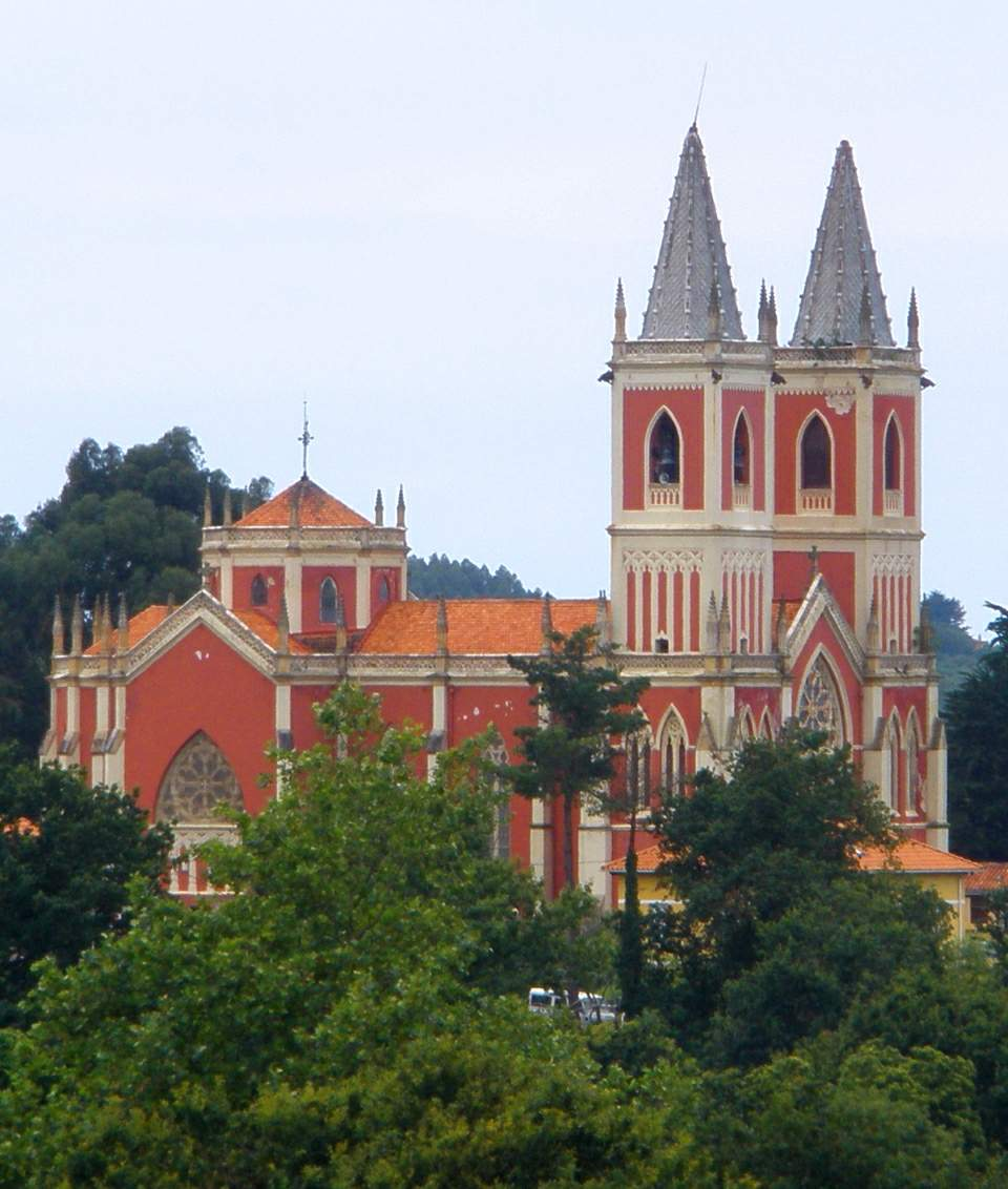 Iglesia de San Pedro ad Víncula, en Cóbreces, Alfoz de Lloredo, Cantabria